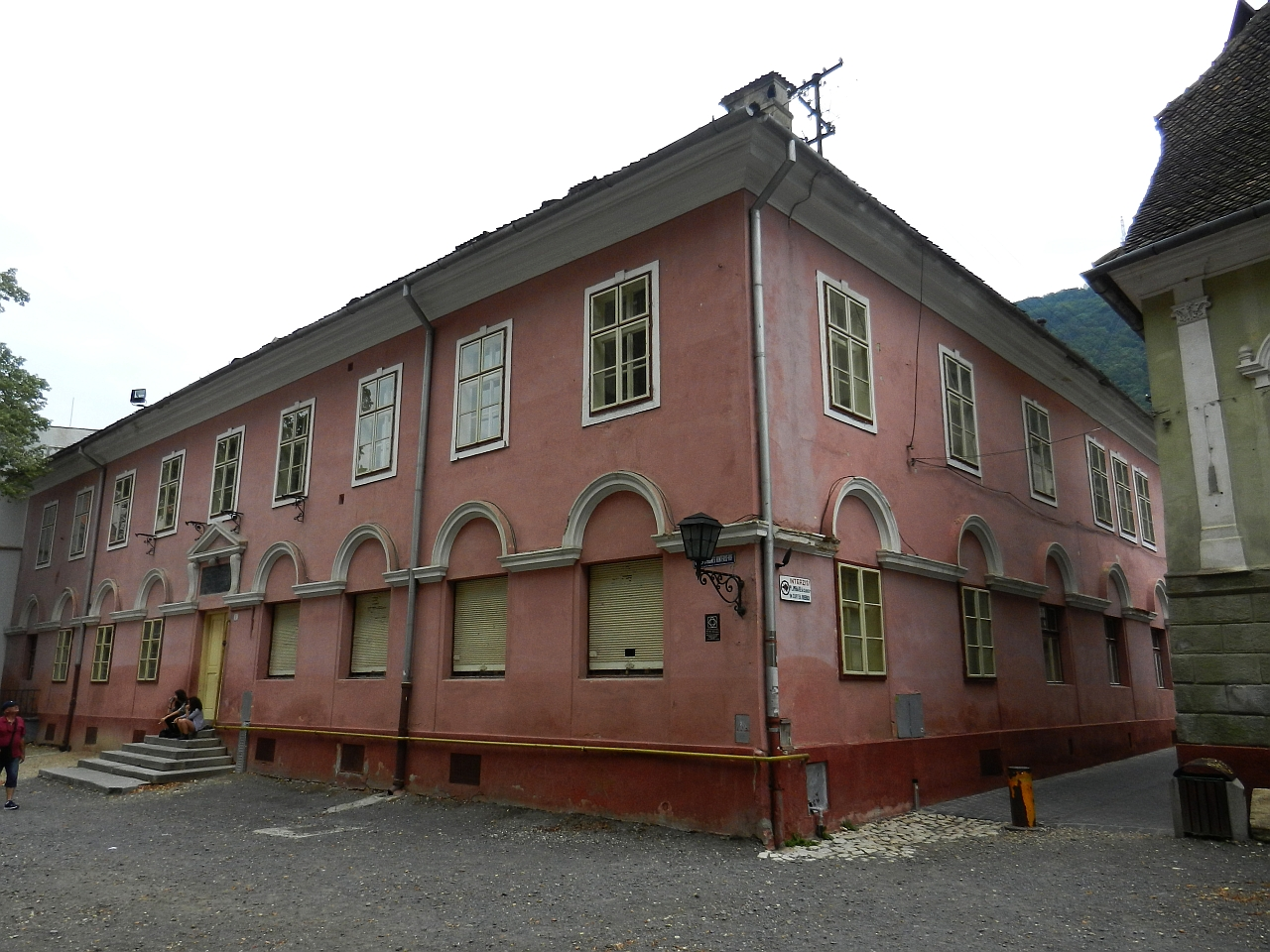 Fosta școală de băieți, azi Corpul A al liceului „Johannes Honterus”